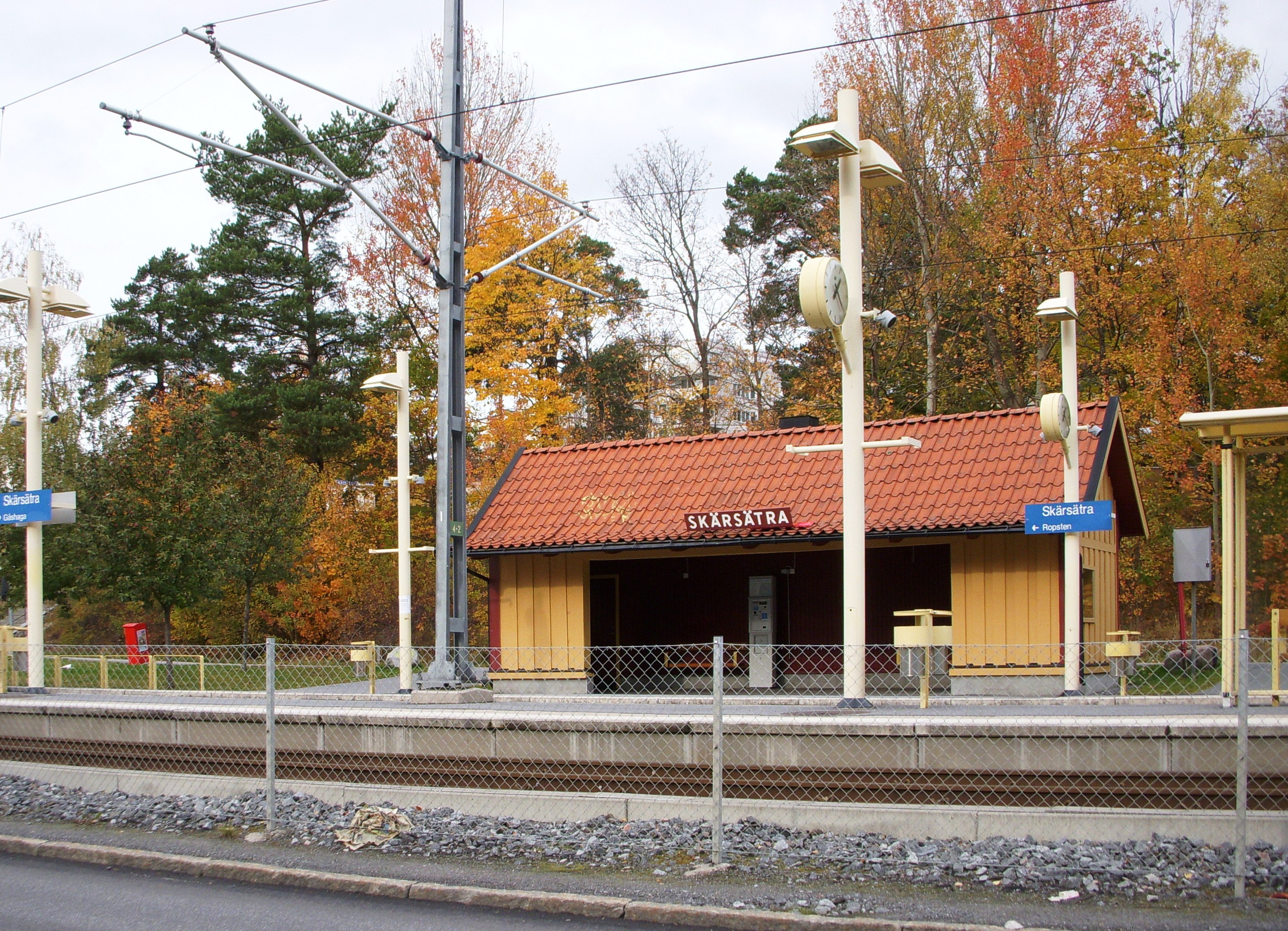 Skärsätra hållplats på Lidingö